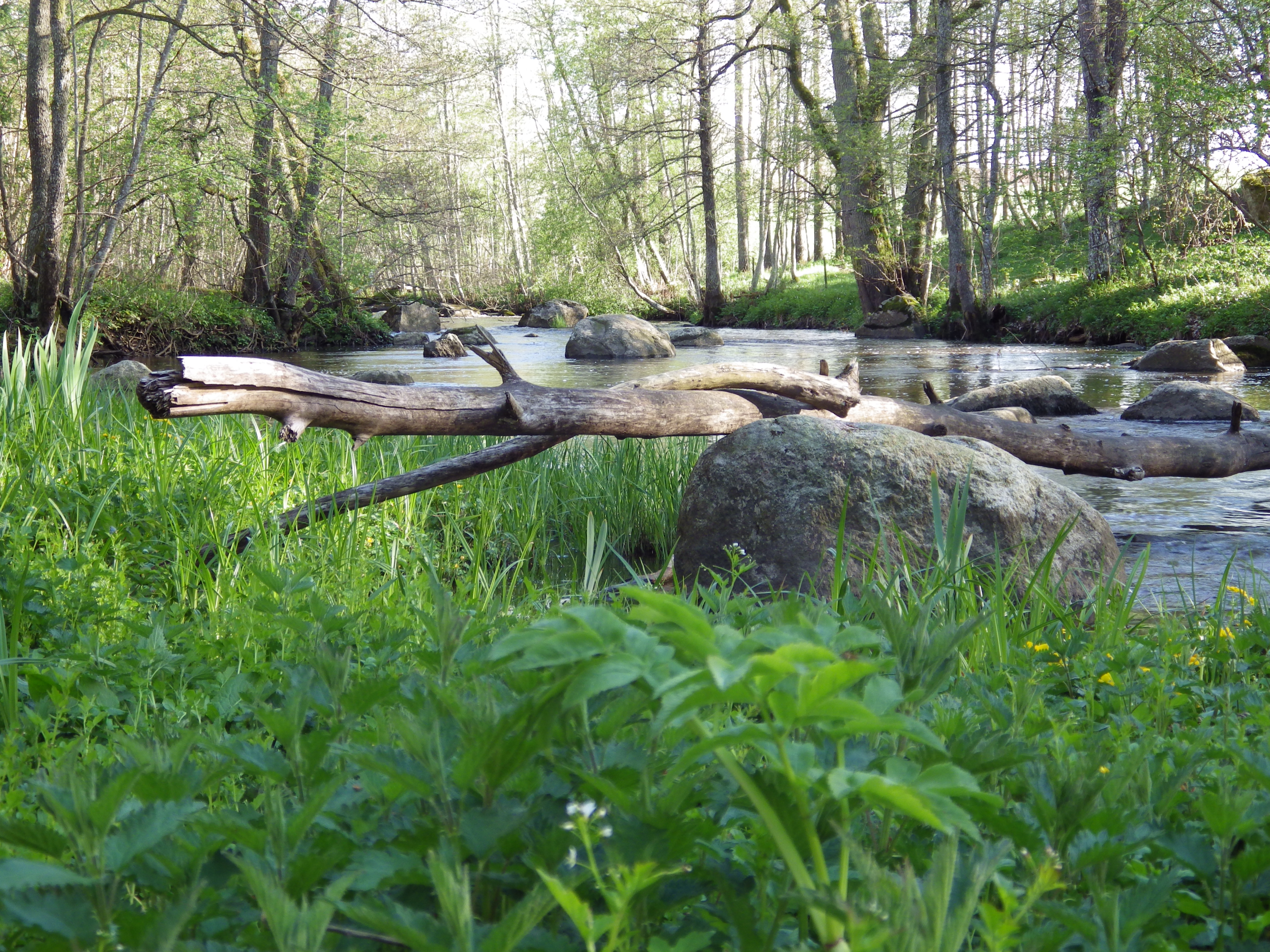 Bilden är tagen i Ösan under Maj månad